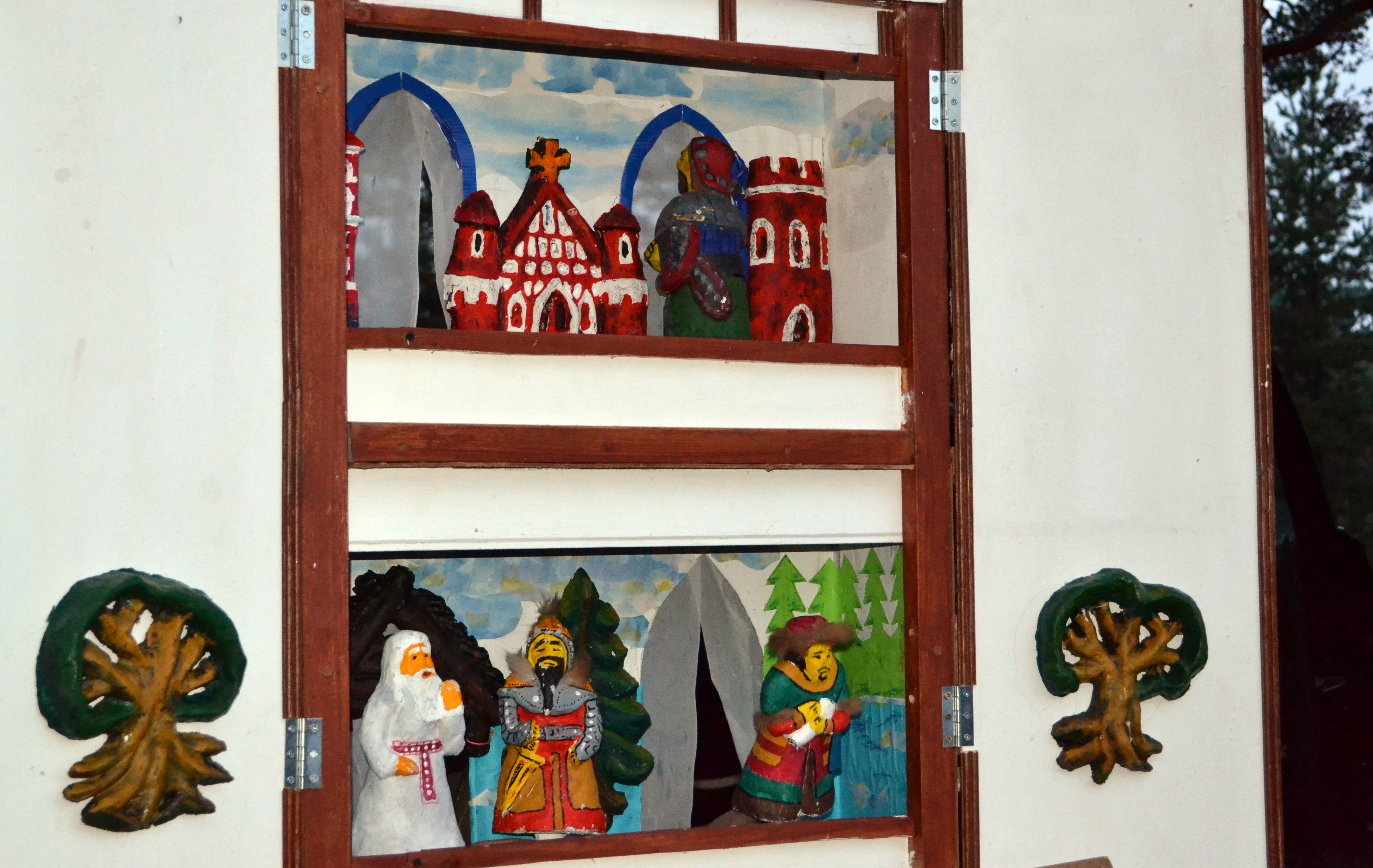 Беларуская (тарашкевіца): Батлейка паводле казкі Уладзімера Караткевіча «Лебядзіны скіт»